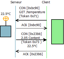 CoAP delayed